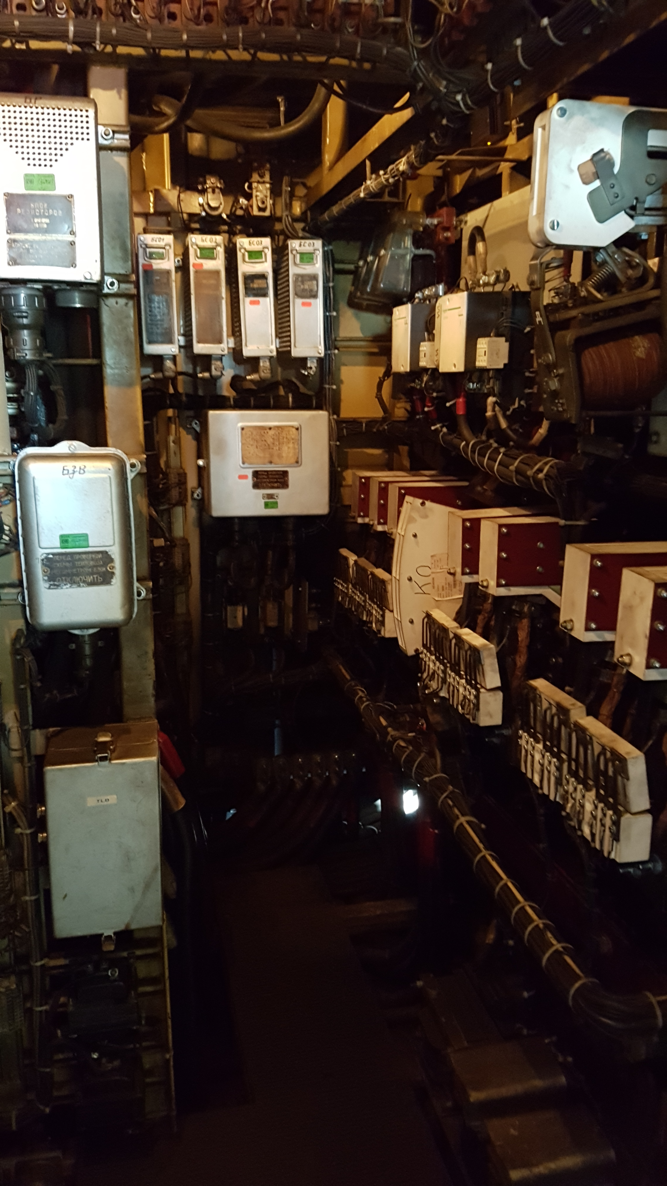 Elektrischer Schaltschrank einer Lokomotive der BR 233.